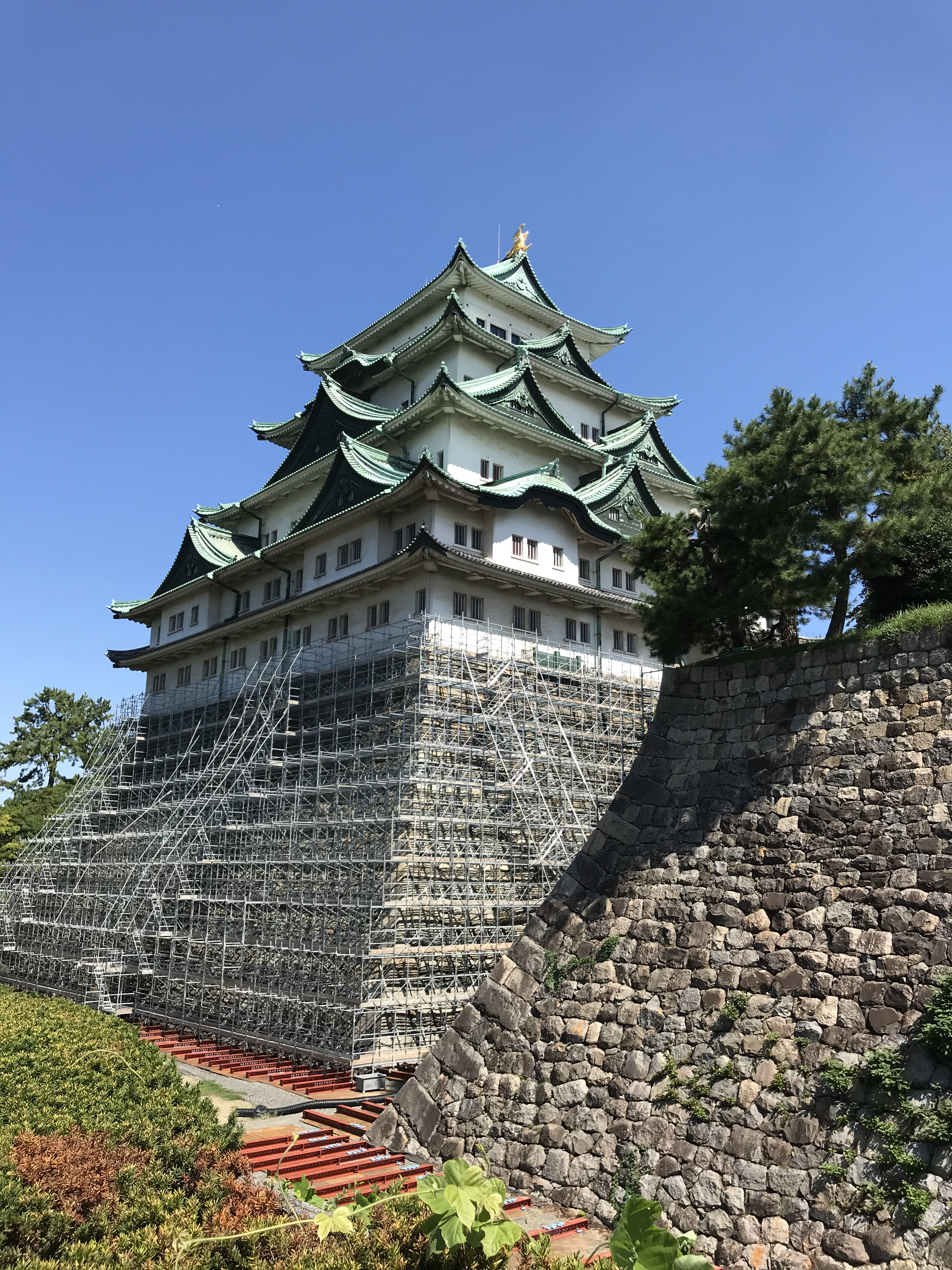 復元作業中の名古屋城天守閣。2018年9月19日撮影。